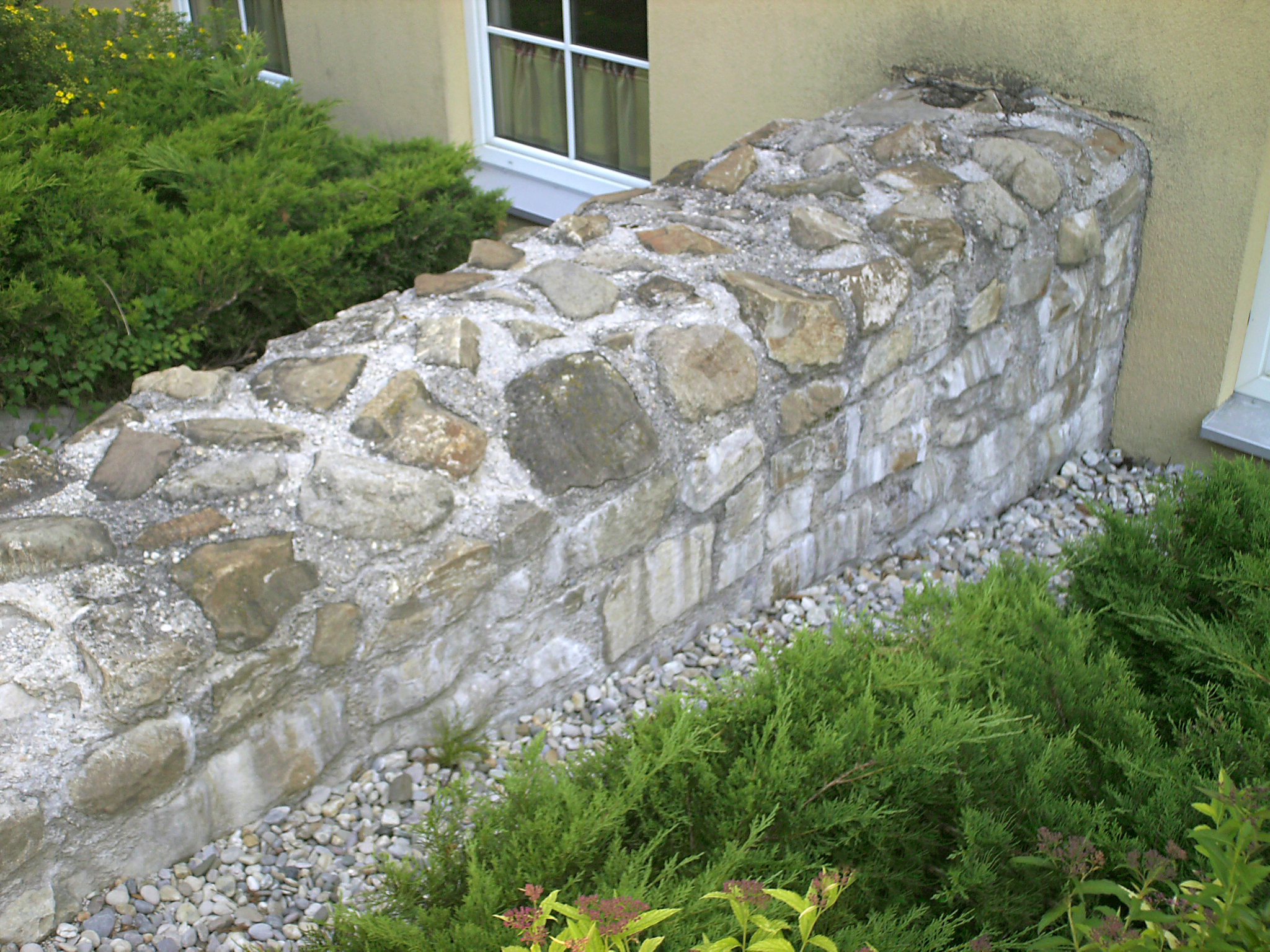 Freigelegter Rest der Südmauer bei der Volksschule Zeiselmauer